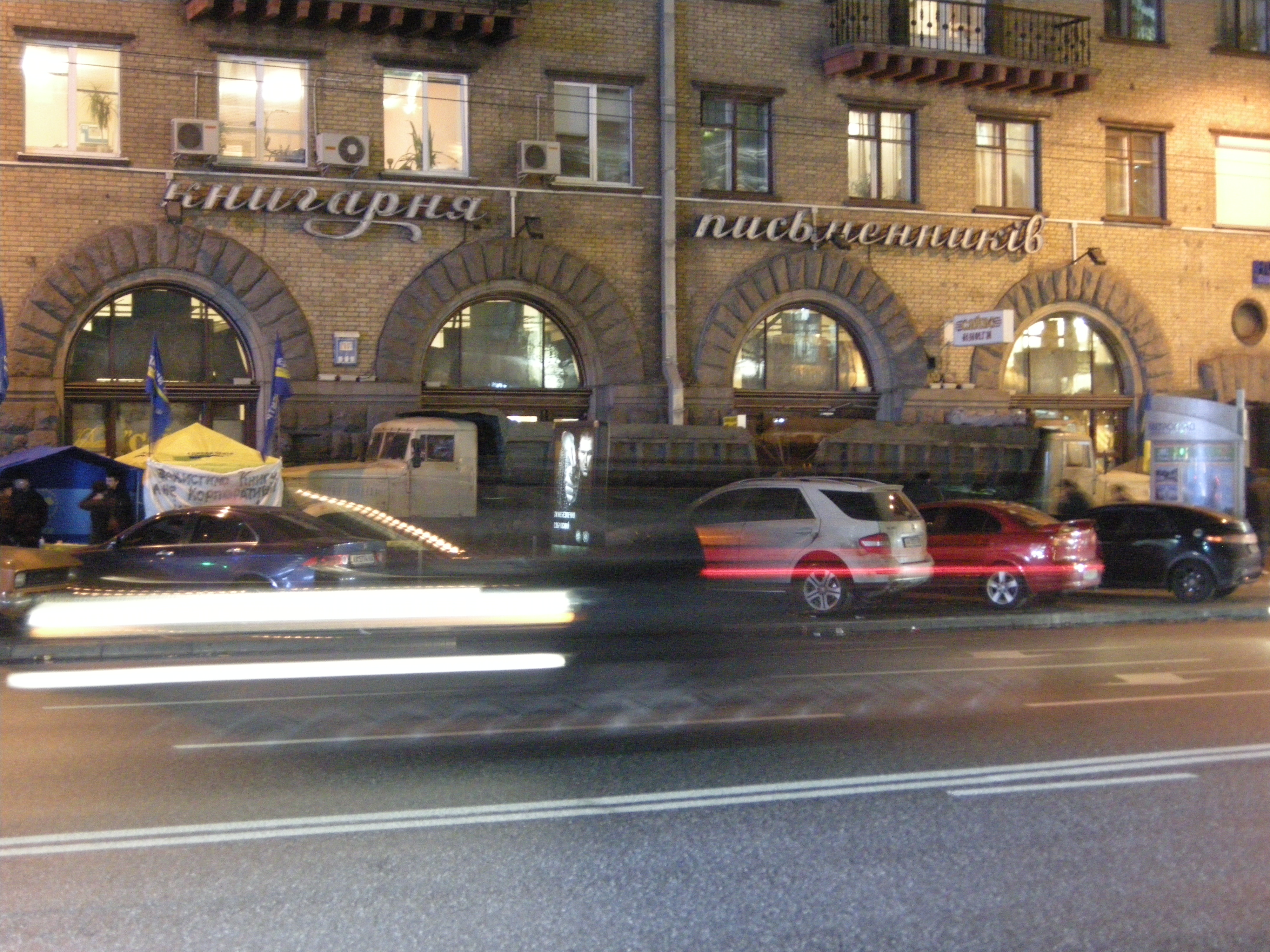 Захоплена вандалами книгарня.